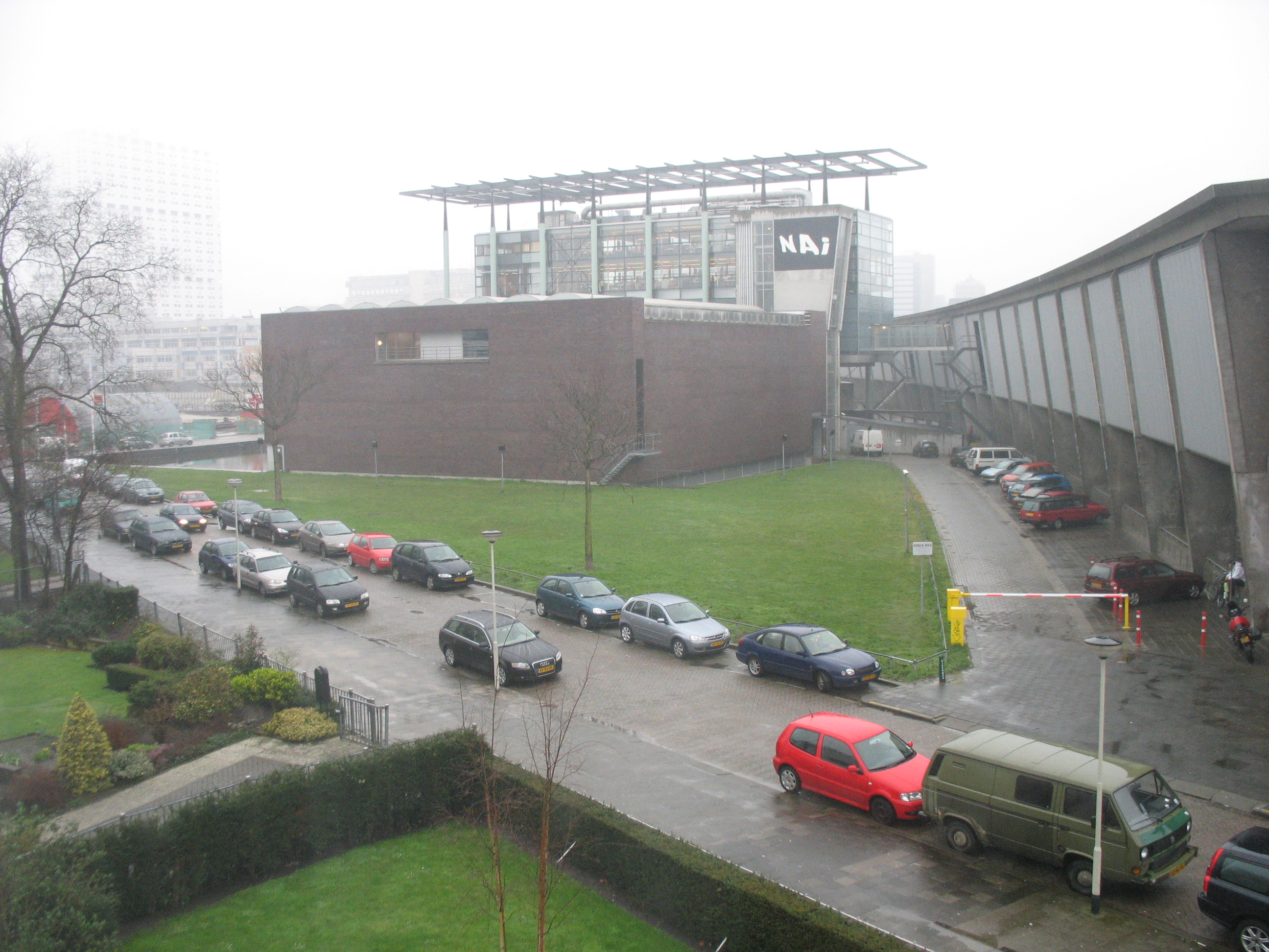 Architectuurmuseum Rotterdam